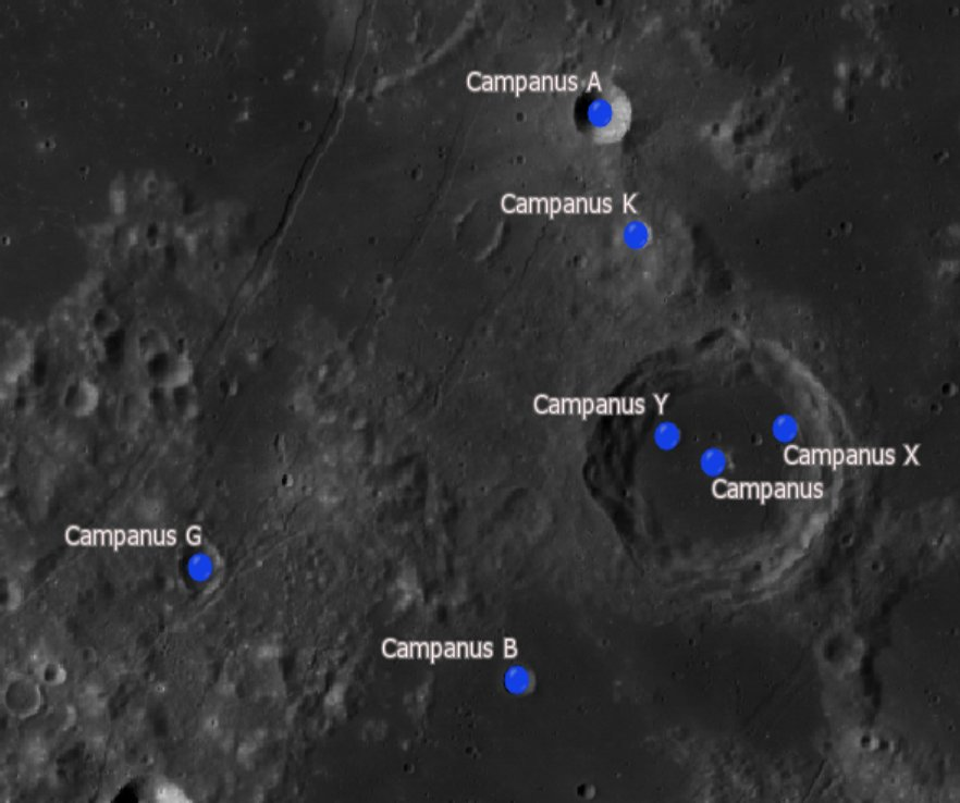 Cráter lunar Campanus. Cráteres satélite. (Imagen LRO)